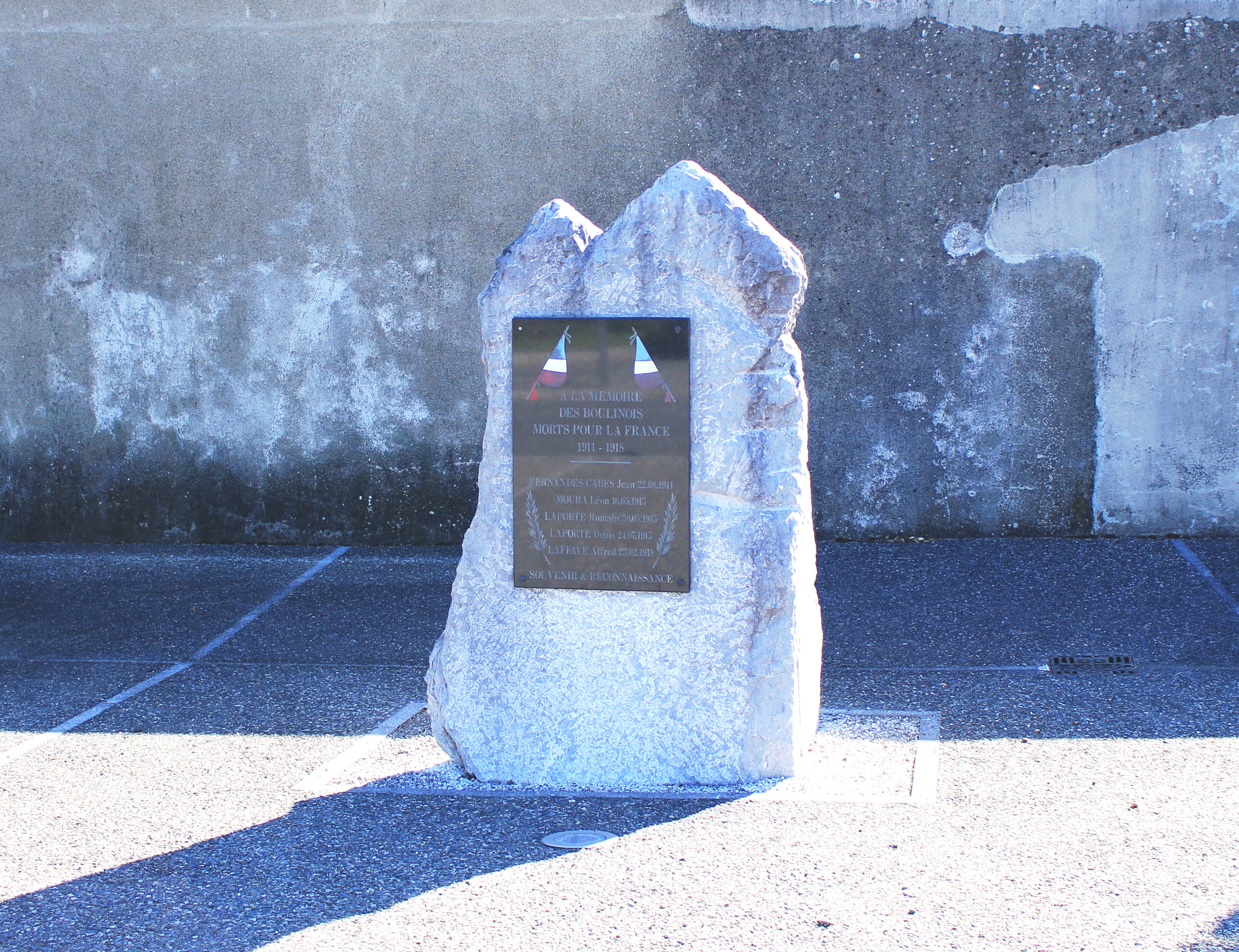 Monument aux morts de Boulin (Hautes-Pyrénées)